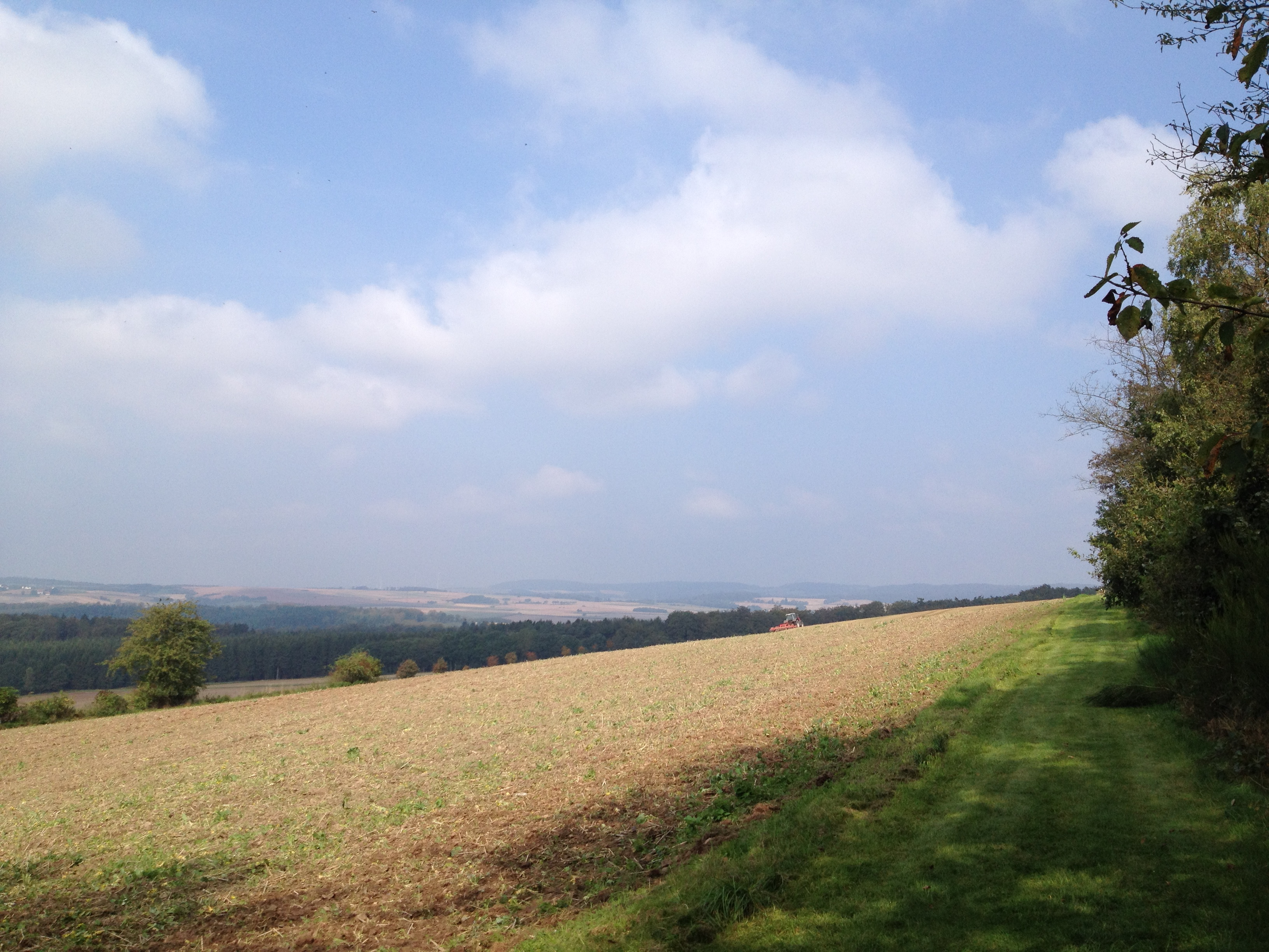 Der Habichtswaldsteig zwischen dem Steinbachskopf und dem Sengelsberg (Aussicht vom Sengelsberg Richtung Netze)